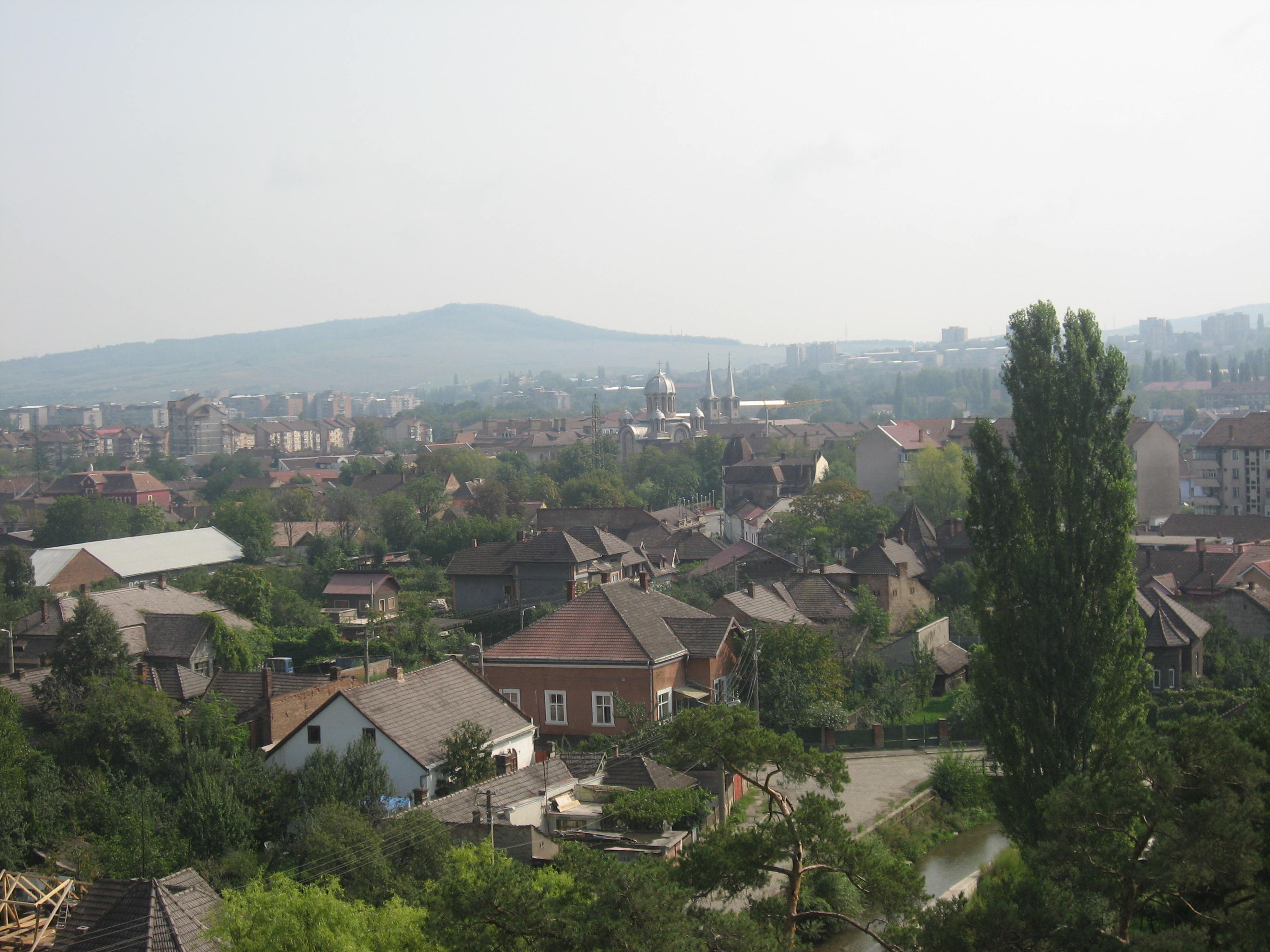 Hunedoara